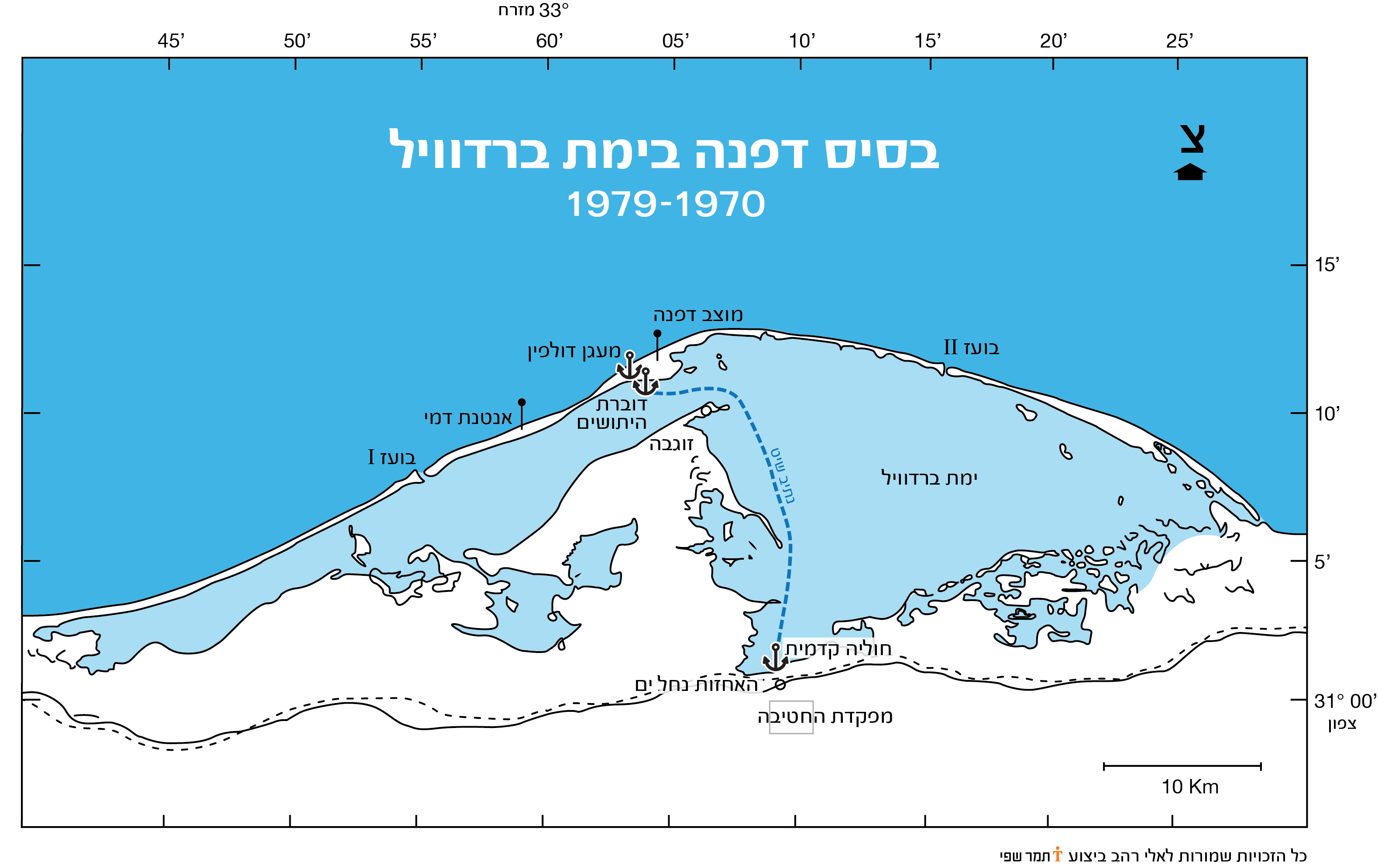 מפת התמצאות בצפון סיני, ימת הברדוויל ובסיס דפנה